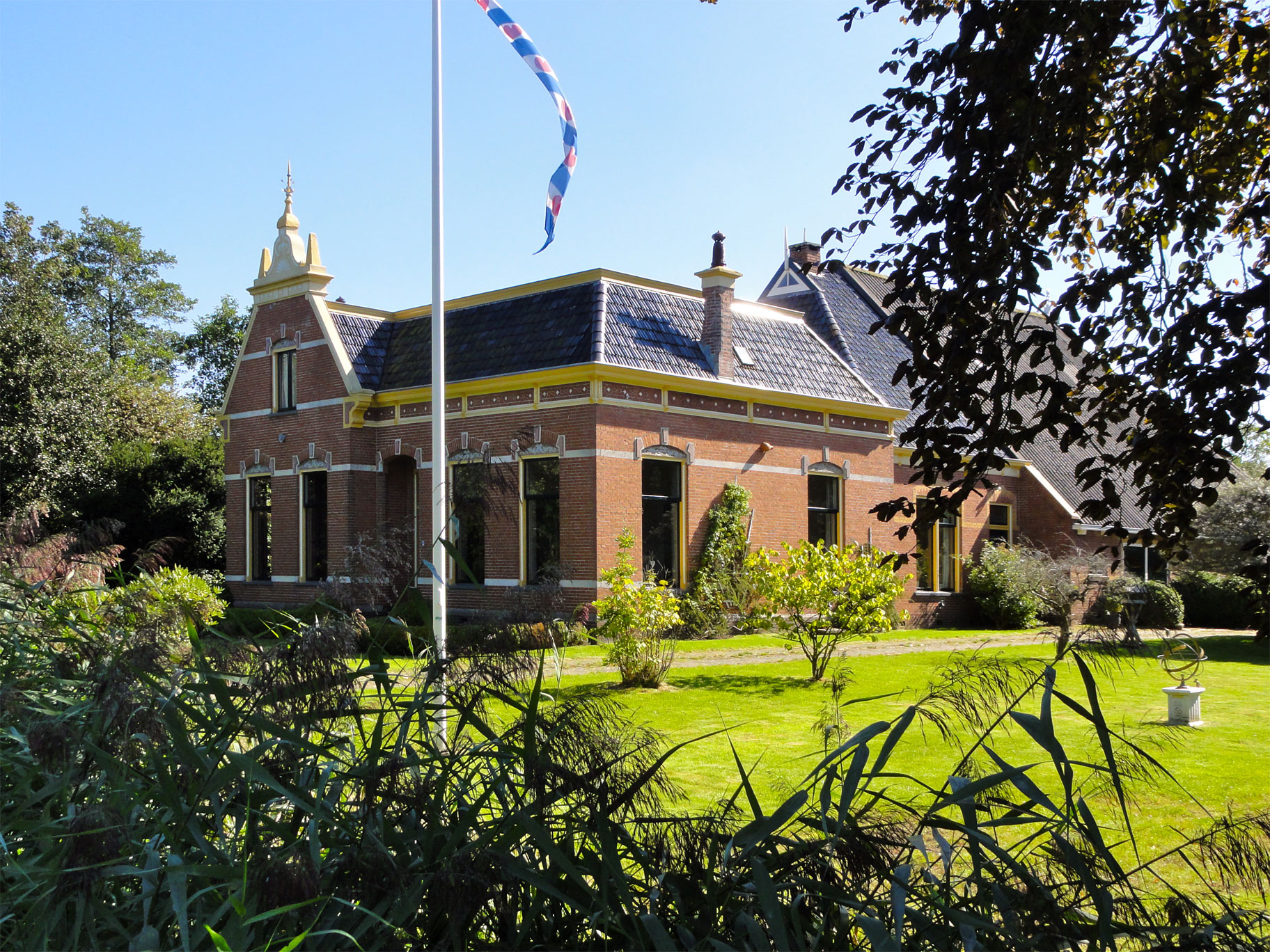 Rentenierswoning aan de Seadwei 6 It Heechsan